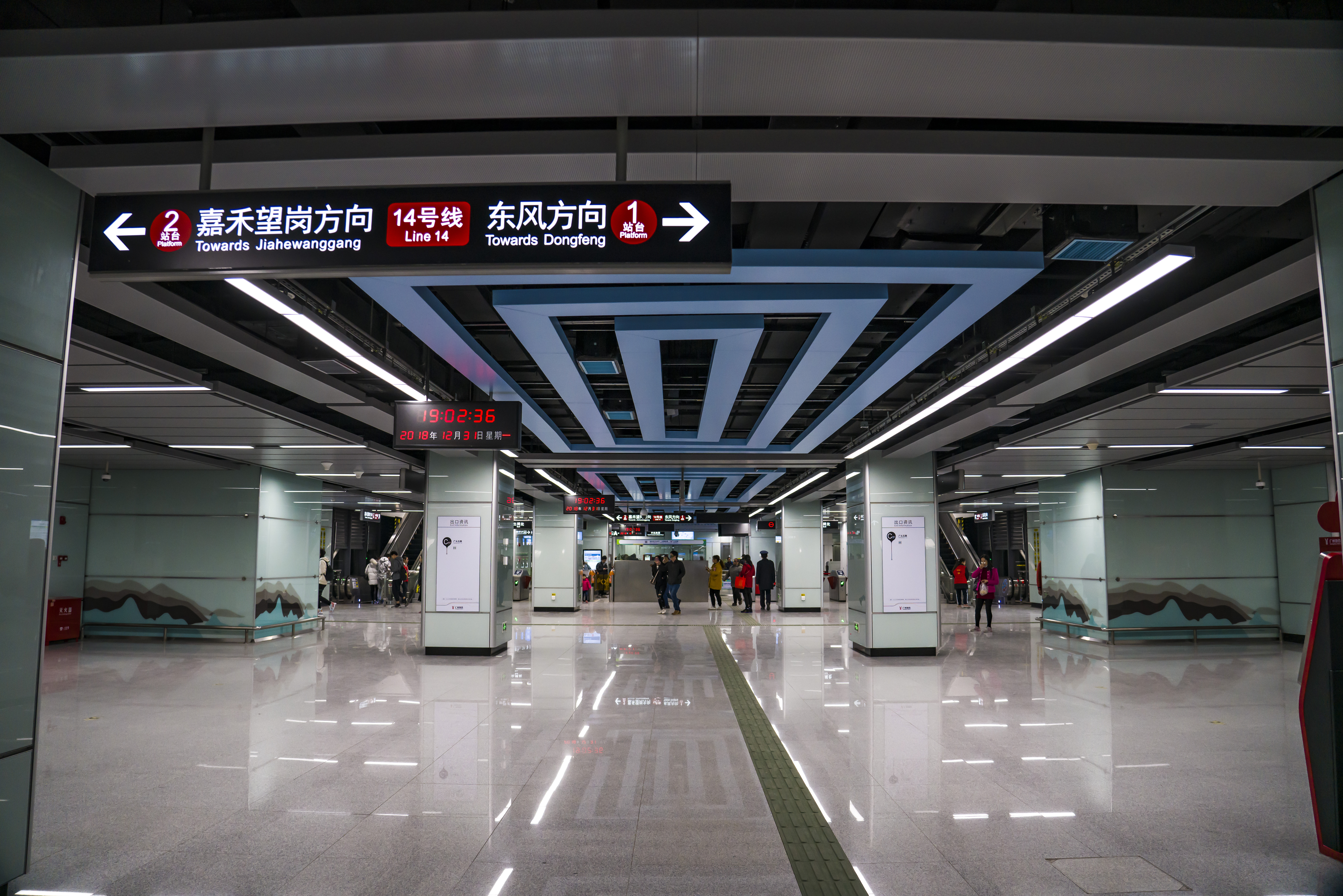 竹料站站厅